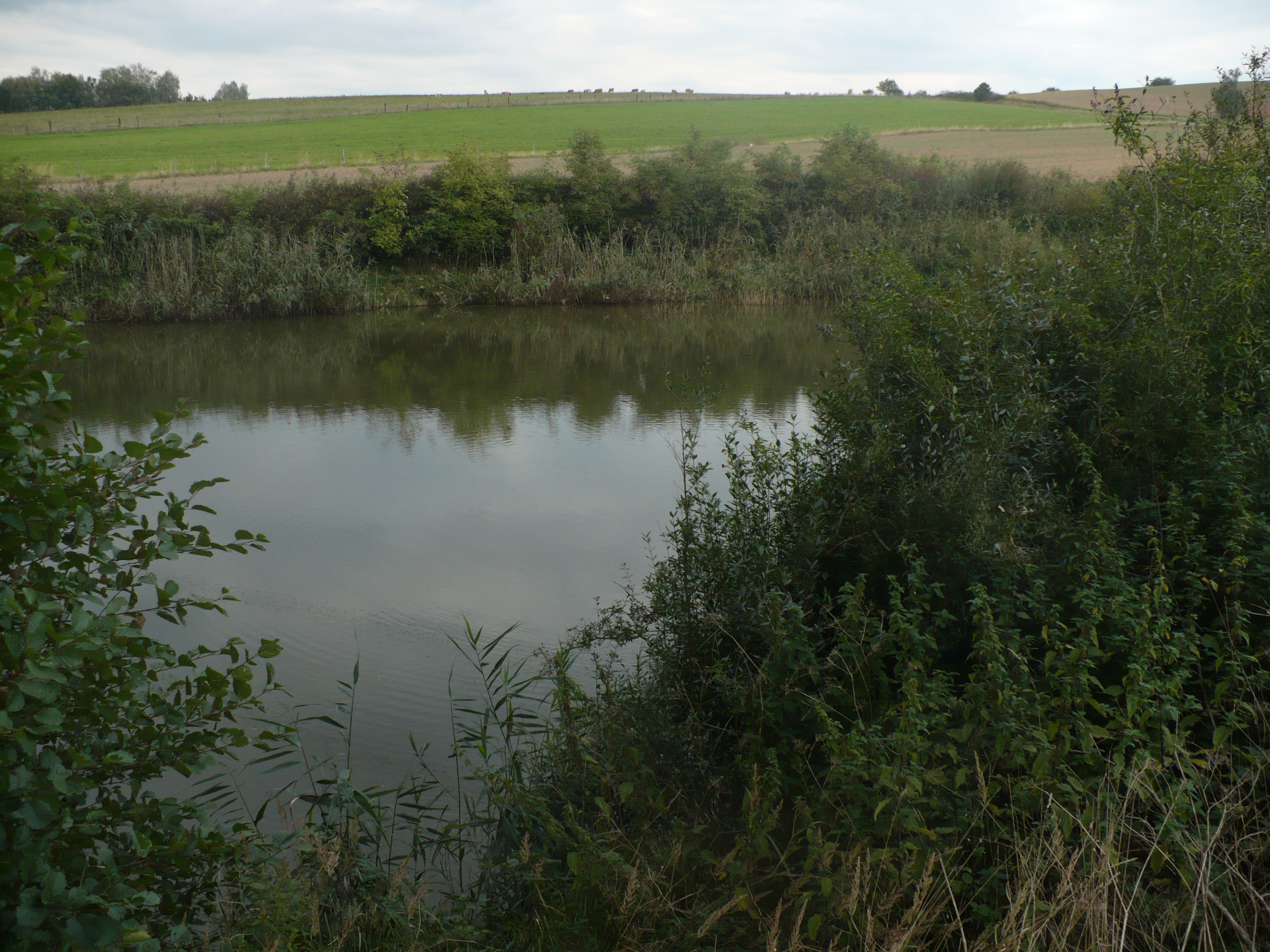 Rybníček poblíž U Kaštánku nedaleko Rudoltic (okres Ústí nad Orlicí)